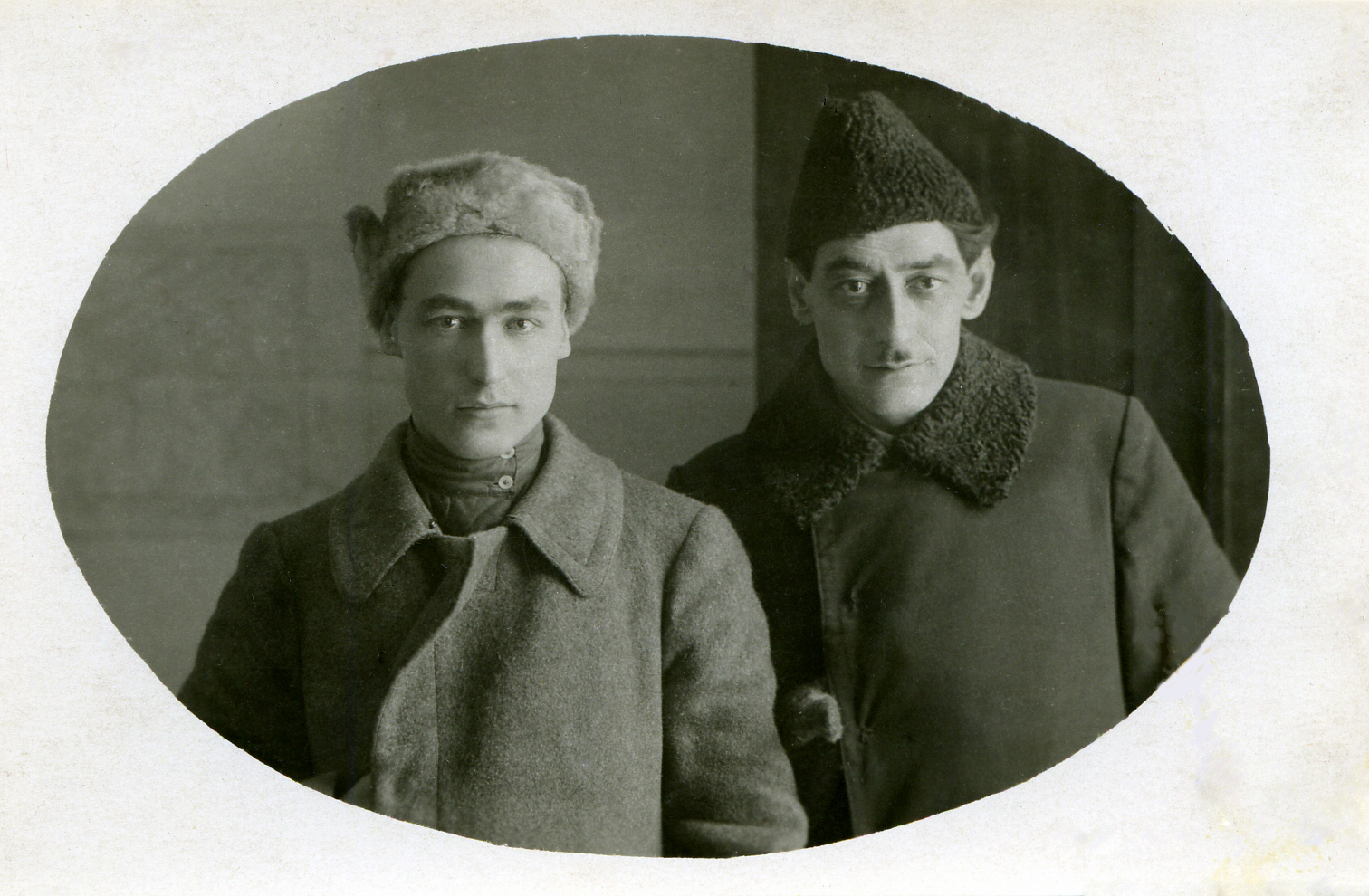 1931г., 20 мая, Пермь. Абатуров Михаил Афанасьевич (парторг и преподаватель марксизма-ленинизма Пермского университета) и Стойчев Степан Антонович (ректор). Фото из архива Абатурова М.А.